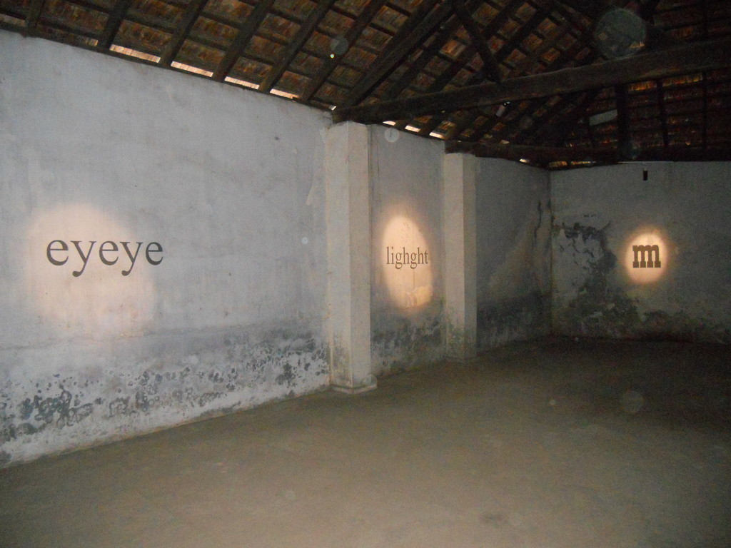 അനുമതി